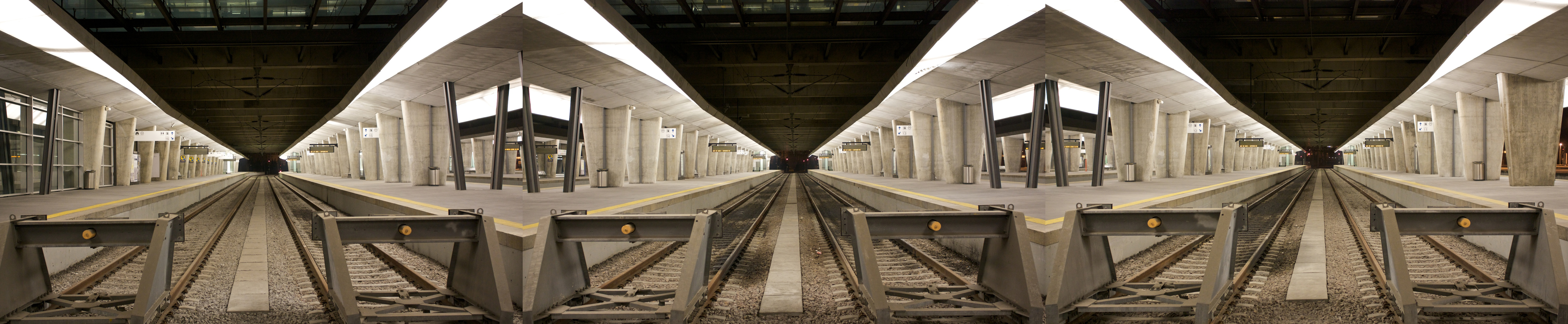 Tipo: EC Estação de Concentração Terminal Minho e Douro Local: Porto Linha do Minho, PK 0,0 • Linha do Norte, PK 336 Data e hora: 28 de Outubro de 2009 pelas 20h30